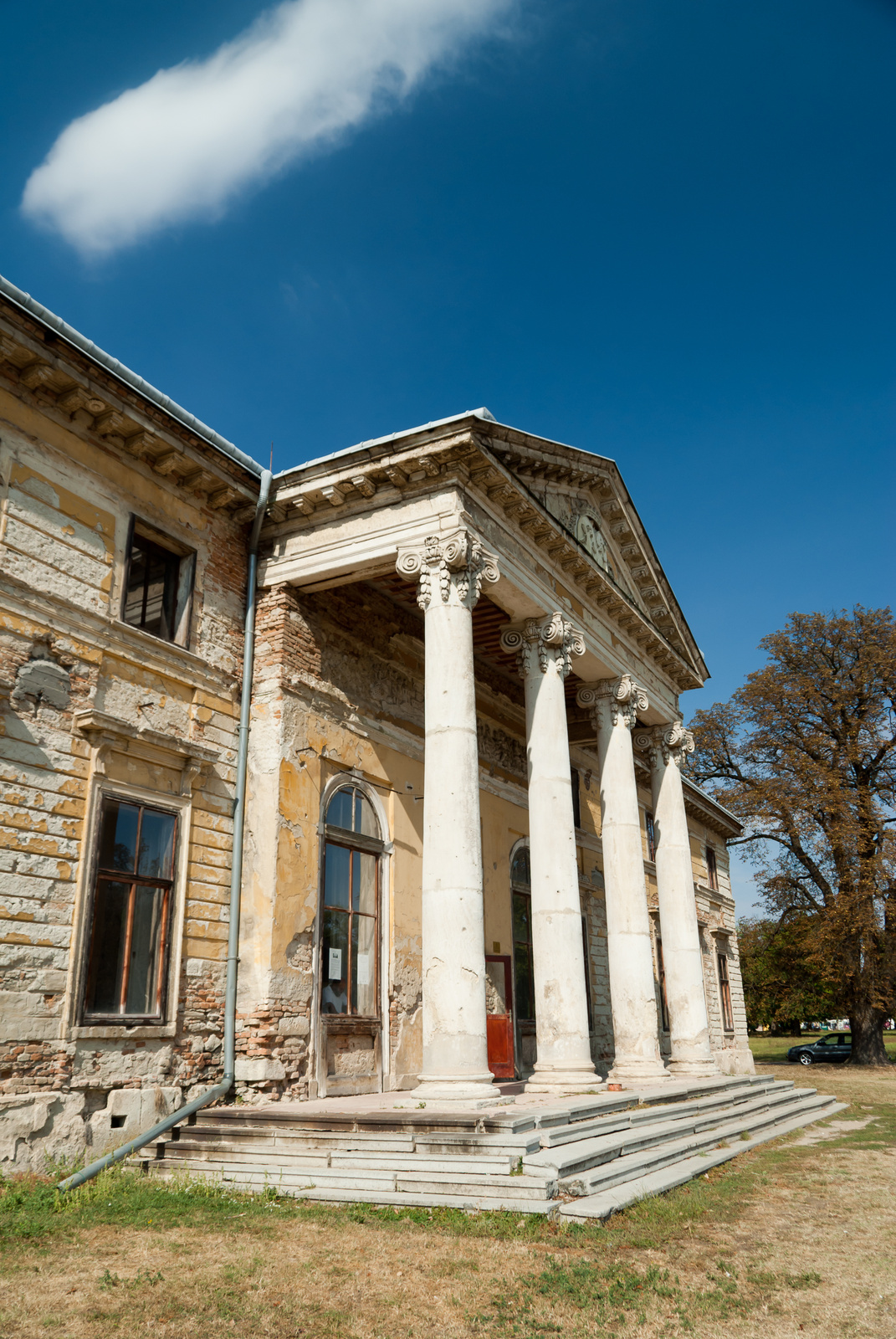 v. Cziráky kastély (Lovasberény, Belmajor) This is a photo of a monument in Hungary, Identifier: 3672